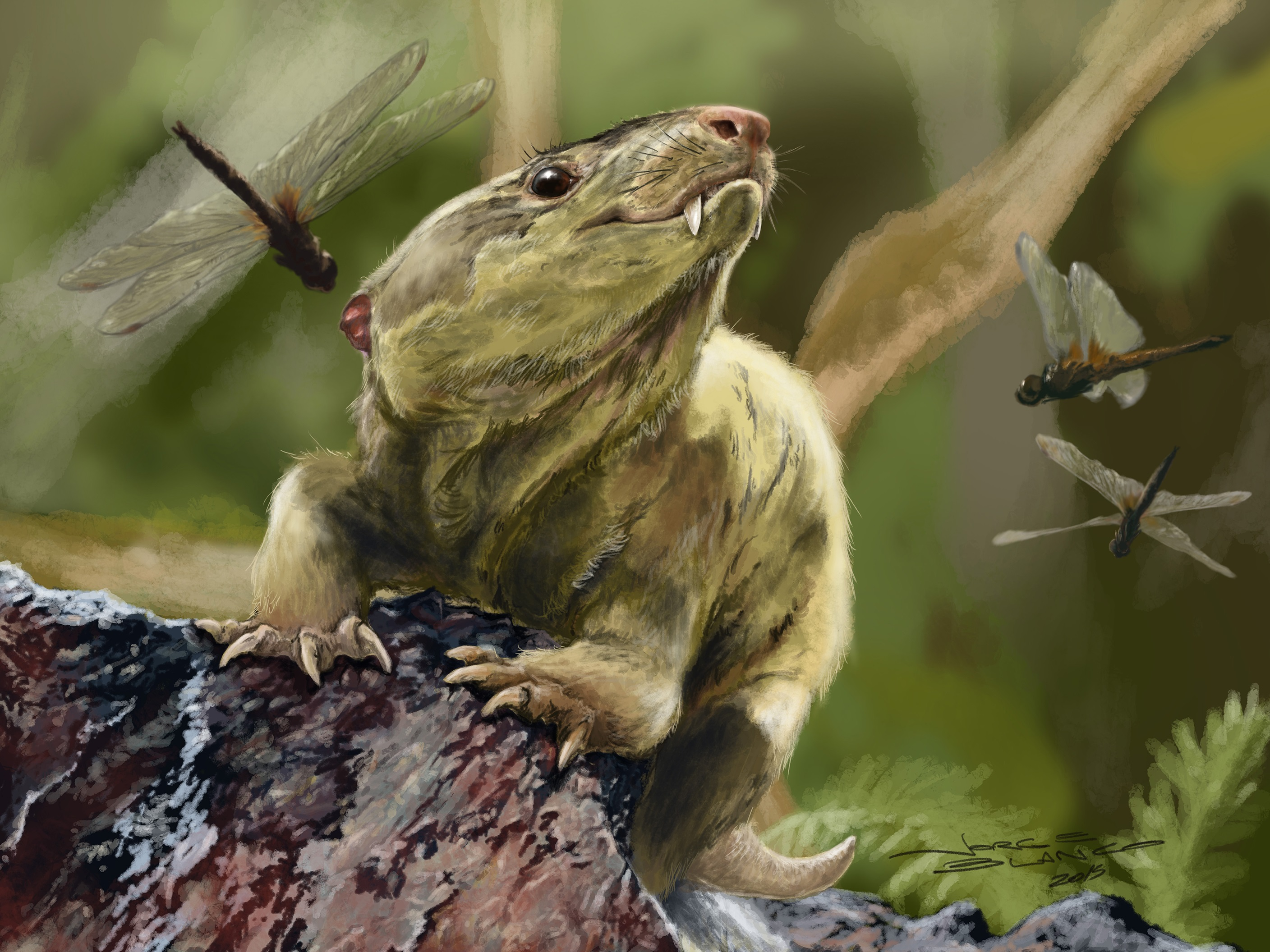 Bonacynodon schultzi reconstruction